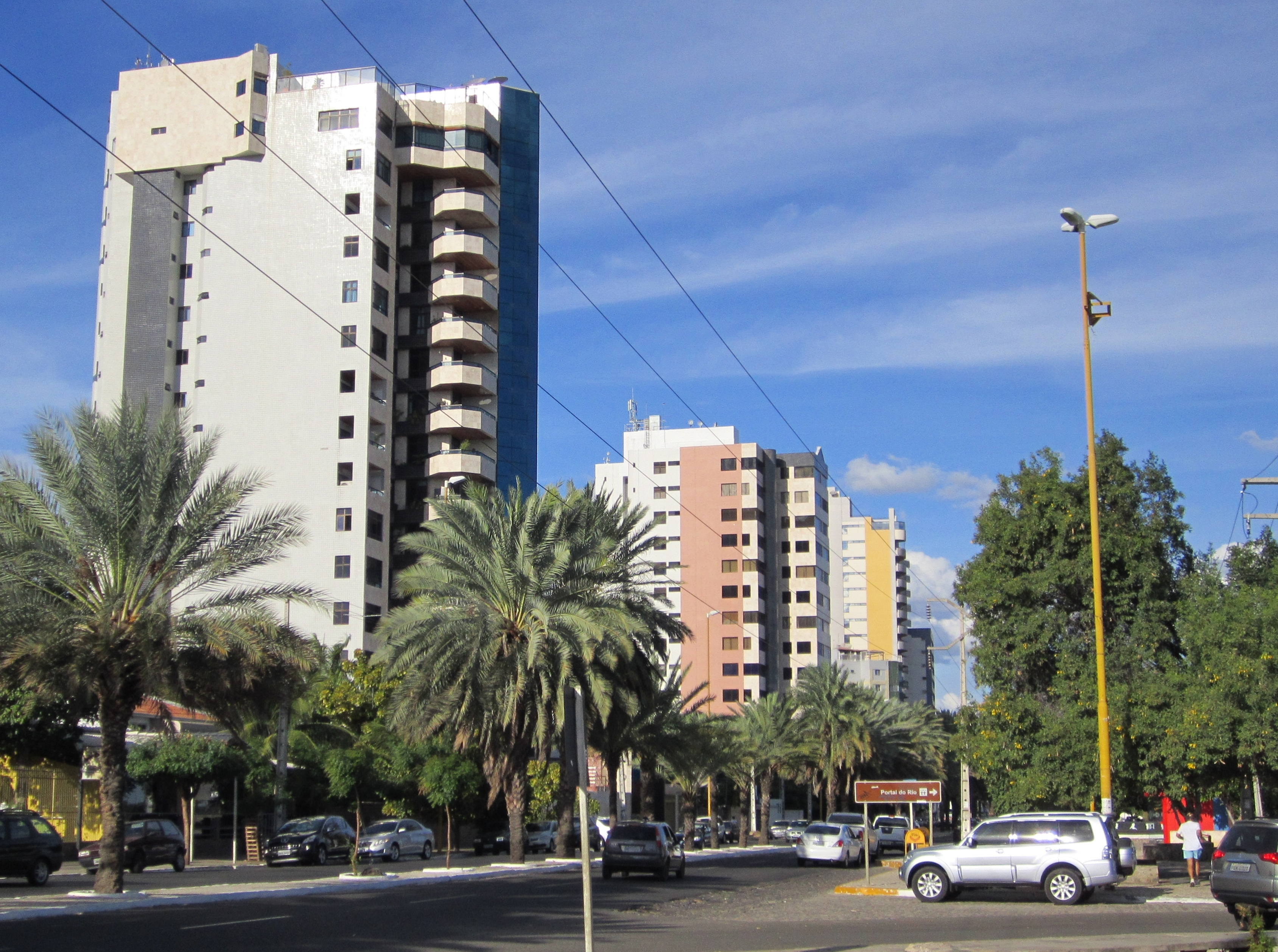 Orla I - Petrolina, Pernambuco, Brasil.